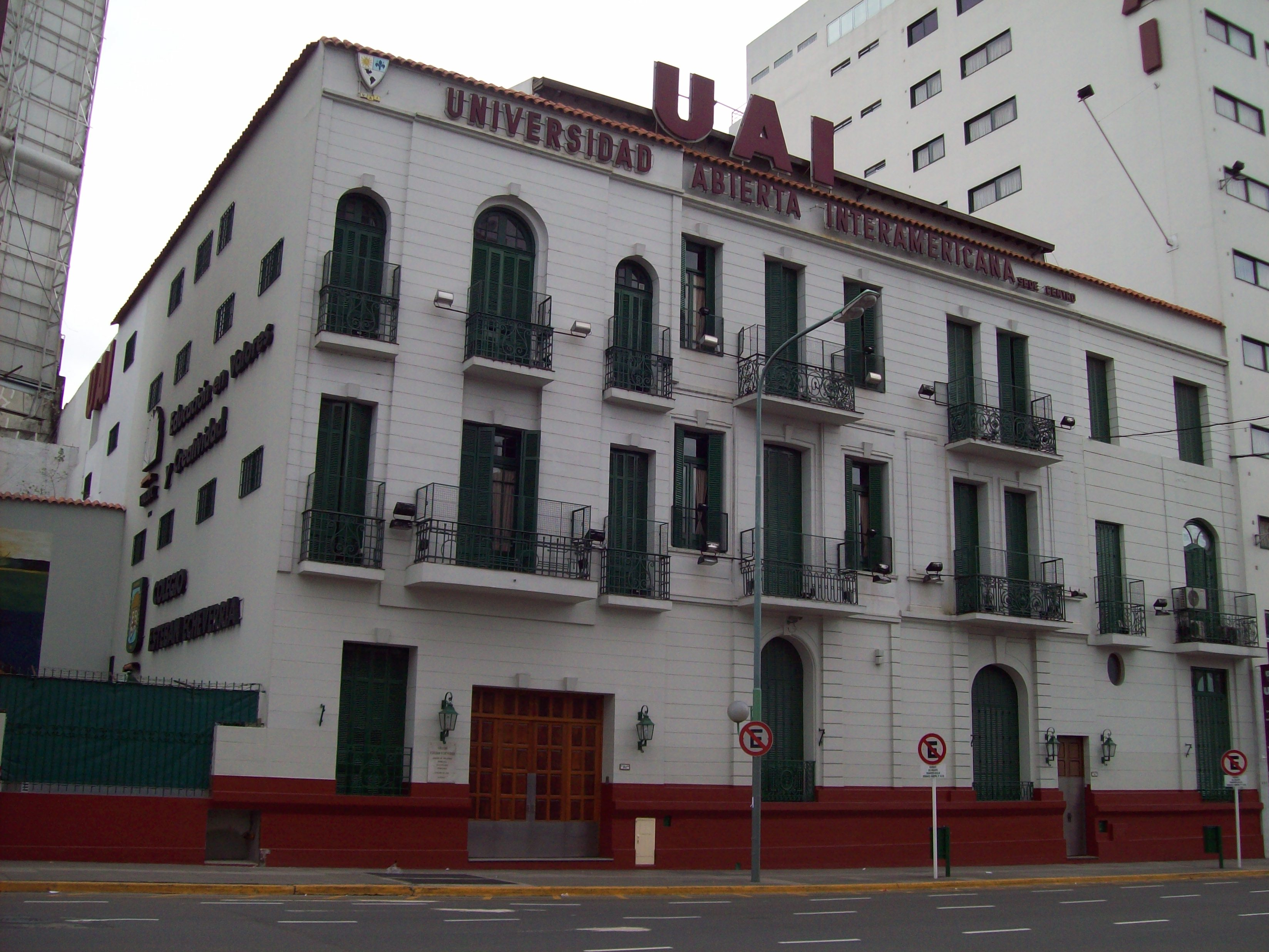 Universidad Abierta Interamericana en Buenos Aires, facultad privada.